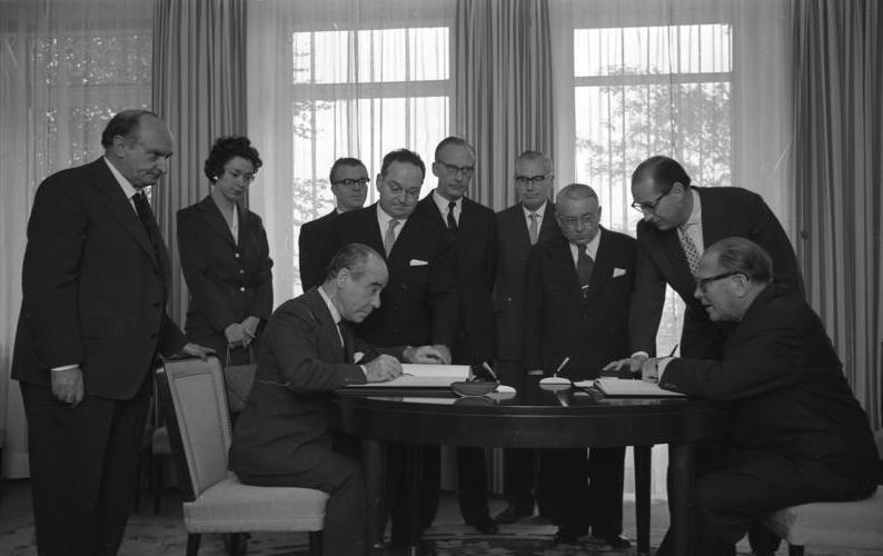 Unterzeichnung des Zusatzabkommens zum deutsch-spanischen Vertrages über Sicherung durch Staatssekretär van Scherpenberg und den spanischen Botschafter